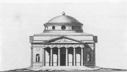 Заходні фасад сабора Св. Іосіфа ў Магілёве